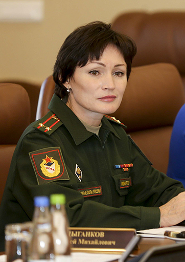 Двукратная олимпийская чемпионка по биатлону подполковник Светлана Ишмуратова во время работы «круглого стола» по обмену передовым опытом, касающимся развития юнармейского движения в регионах России